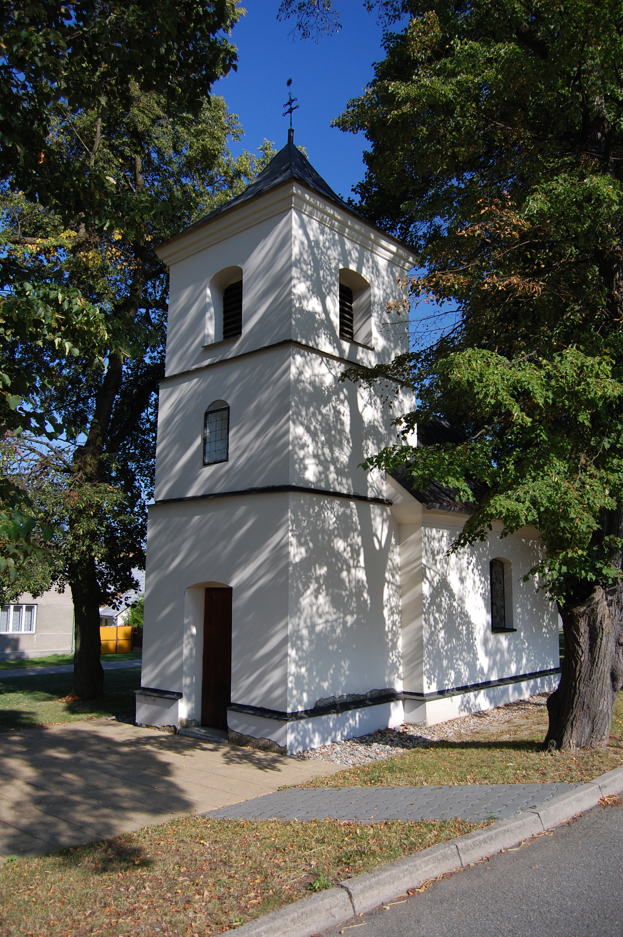 Kaplička svatého Vavřince na Hrochově - boční pohled, Lipová, okres Prostějov